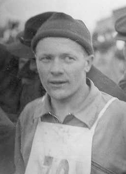 Paavo Lonkila